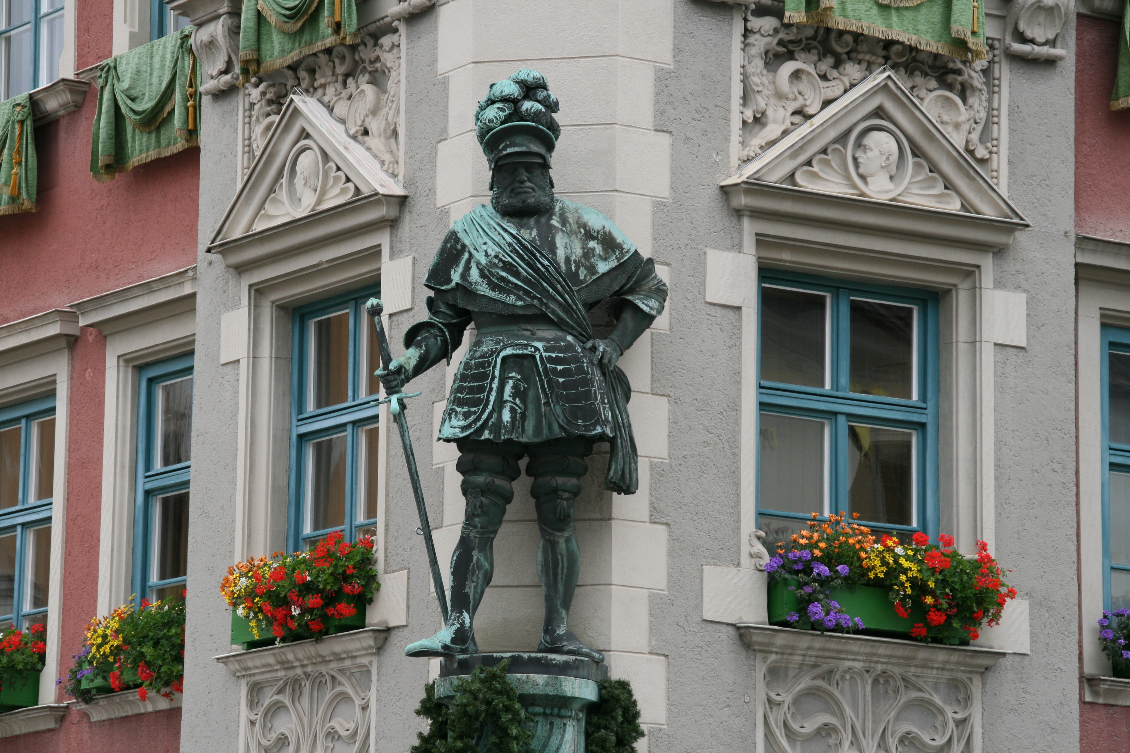 Standbild Georg von Frundsbergs am Rathaus im bayerischen Mindelheim (Landkreis Unterallgäu).